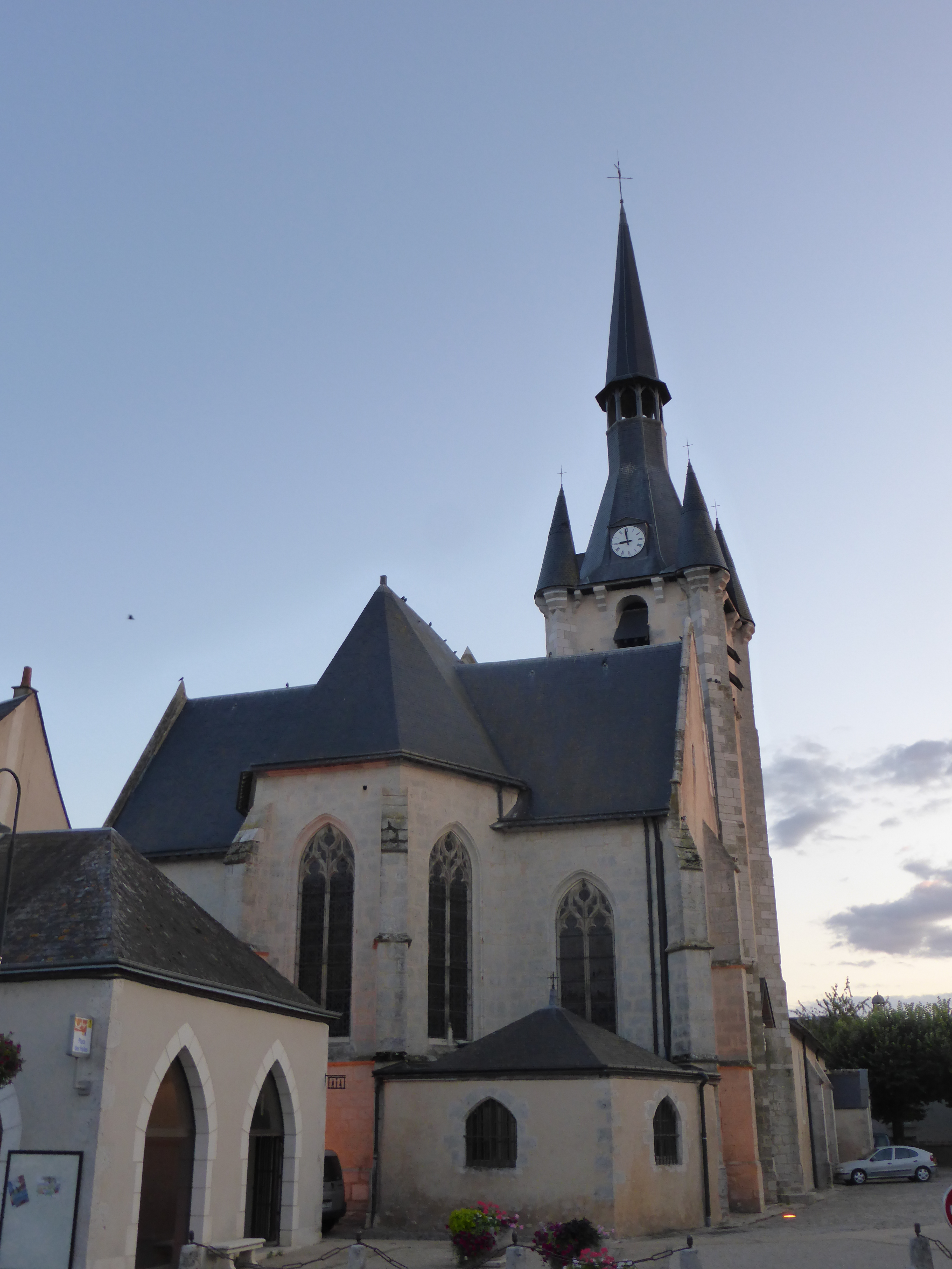 Église Saint-André de Patay, dans le Loiret.